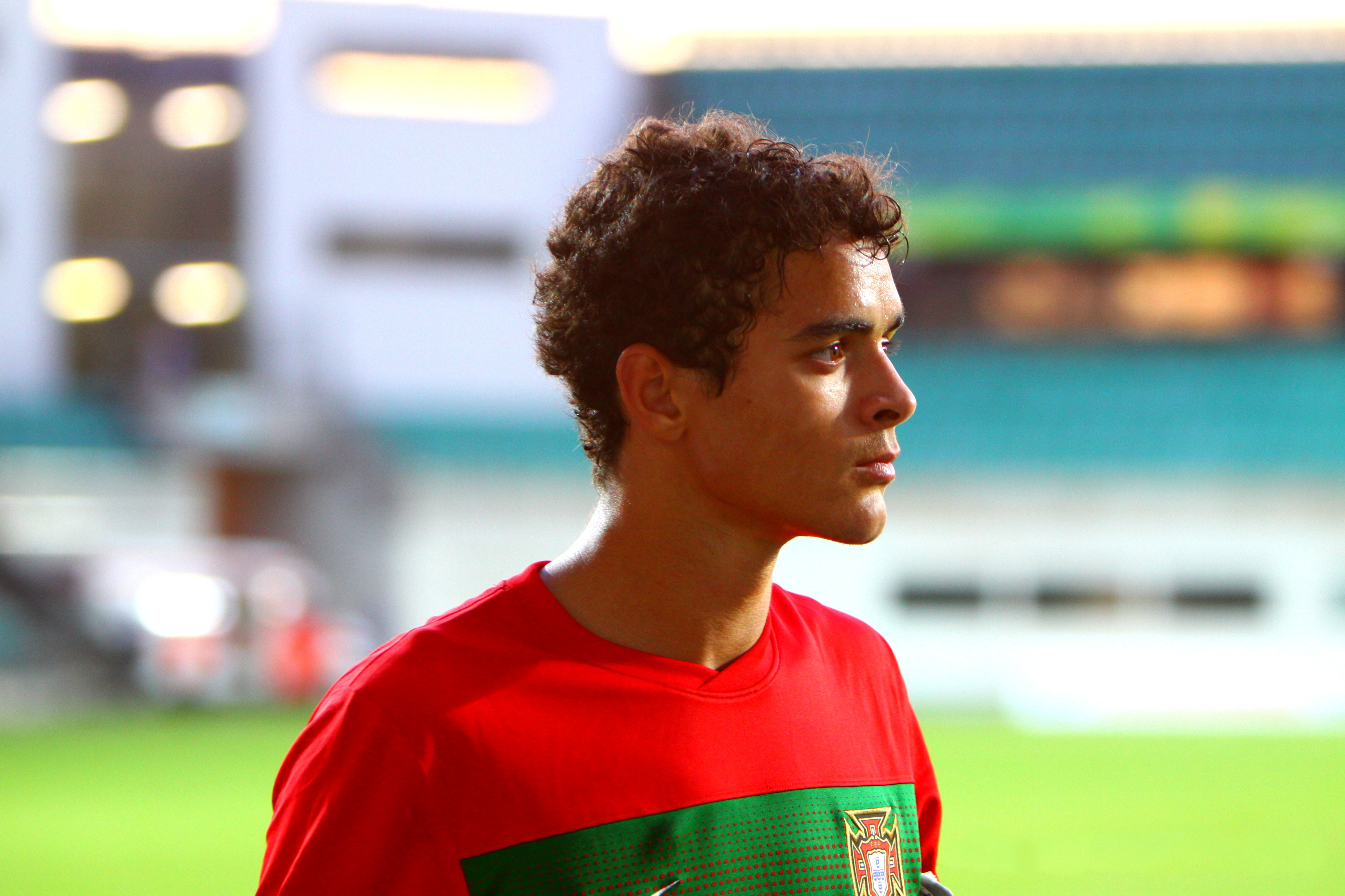 U-19 Estonia vs Portugal.